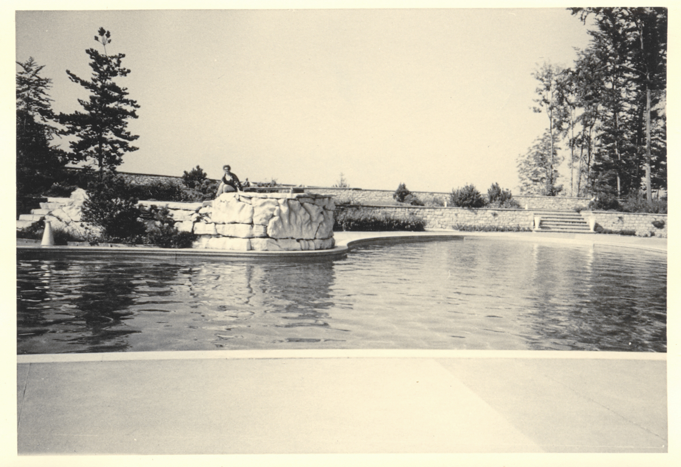 Bürgenstock (Schweiz), Schwimmbad beim Hotel, beschriftet „Bürgenstock Sept. 1956""